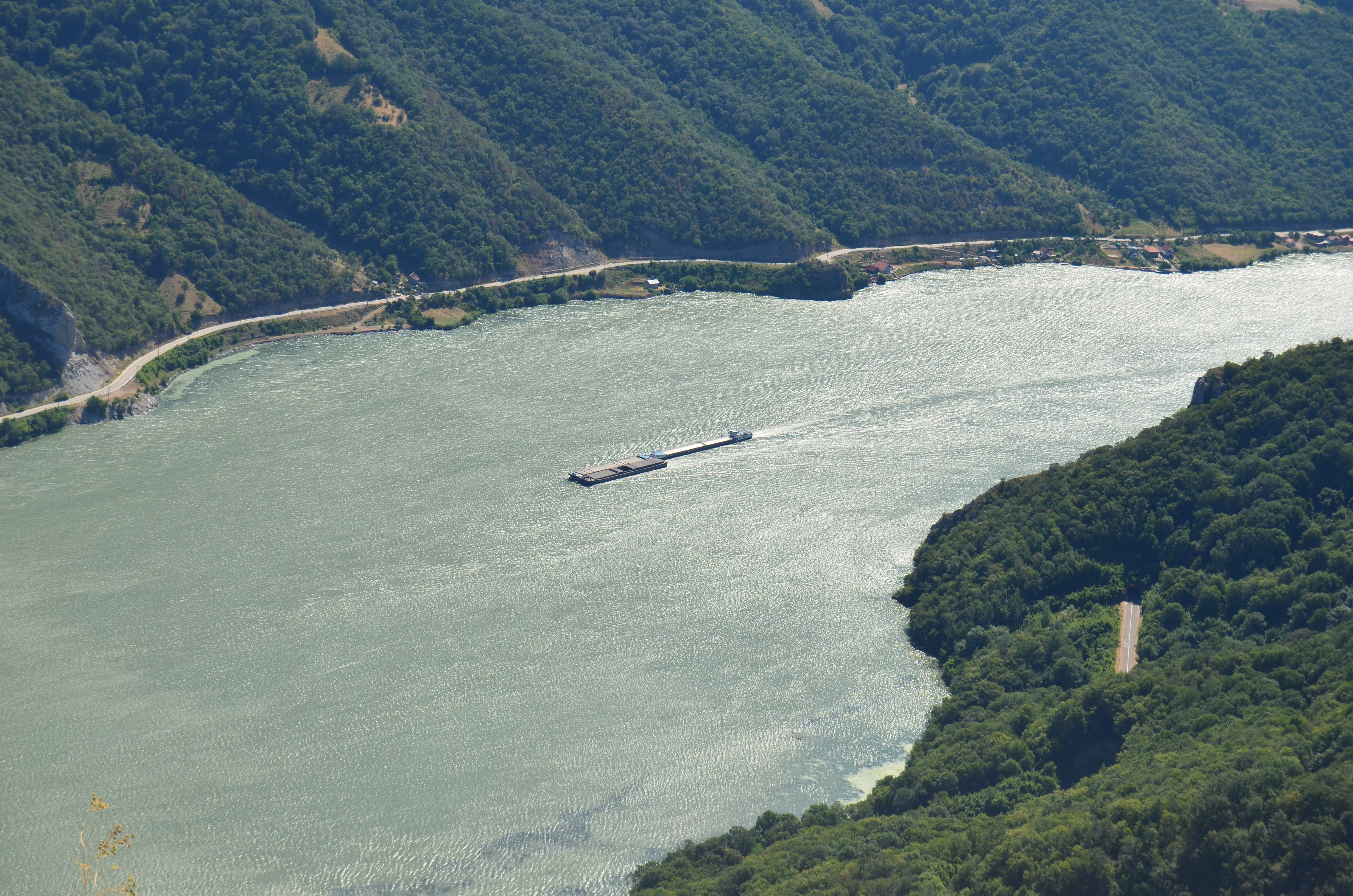 Srpski (latinica): Vidikovac Sokolovac Ово је фотографија заштићеног природног добра у Србији под шифром: НП04This is a a photo of a natural area in Serbia with ID: НП04